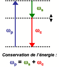 Description : Conservation de l'énergie dans un OPO et diagramme des niveaux virtuels acessibles aux ondes pompe, signal, et complémentaire. Source : personnelle Catégorie:Schéma de physique